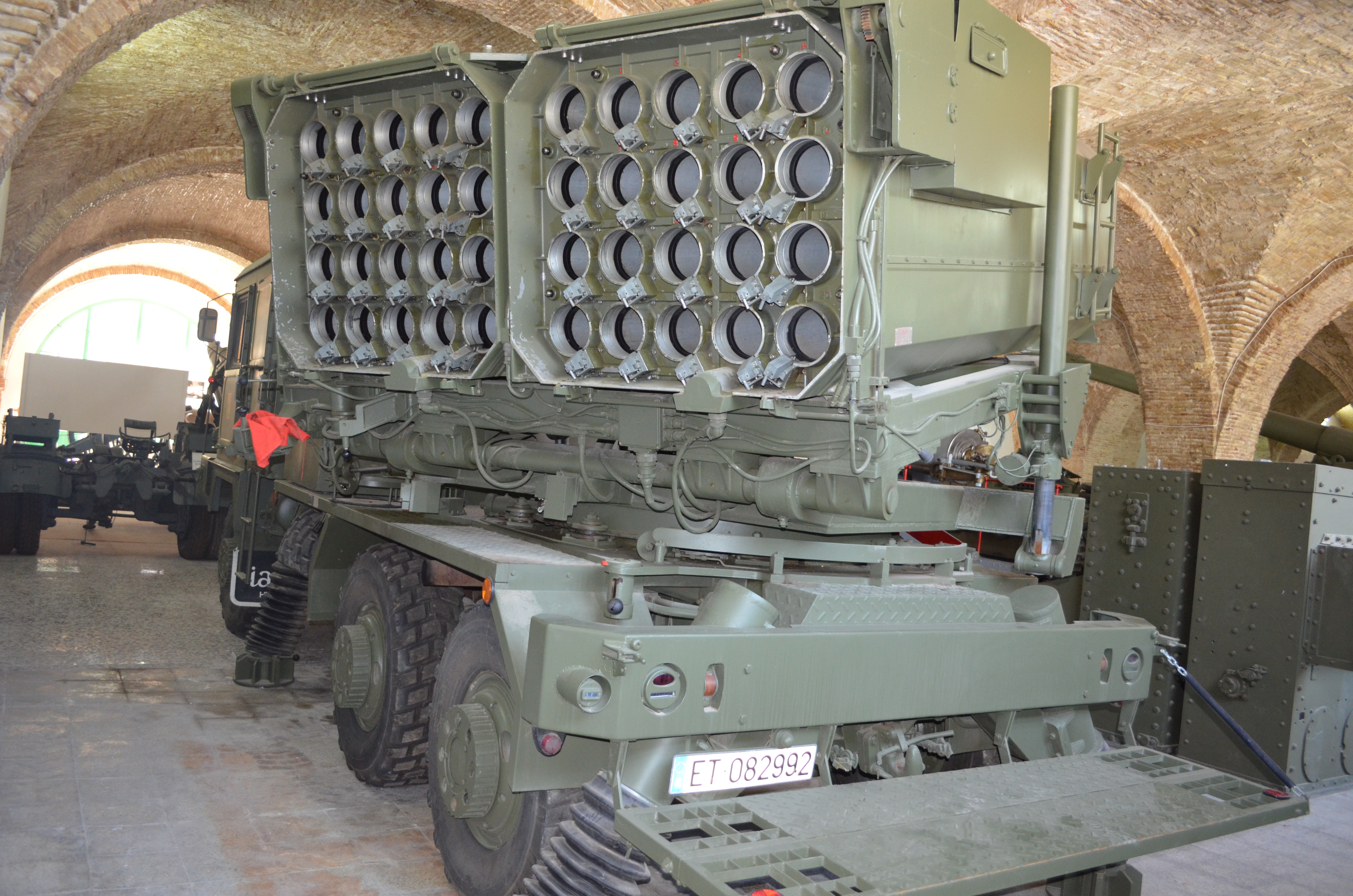 Lanzacohetes múltiple Teruel